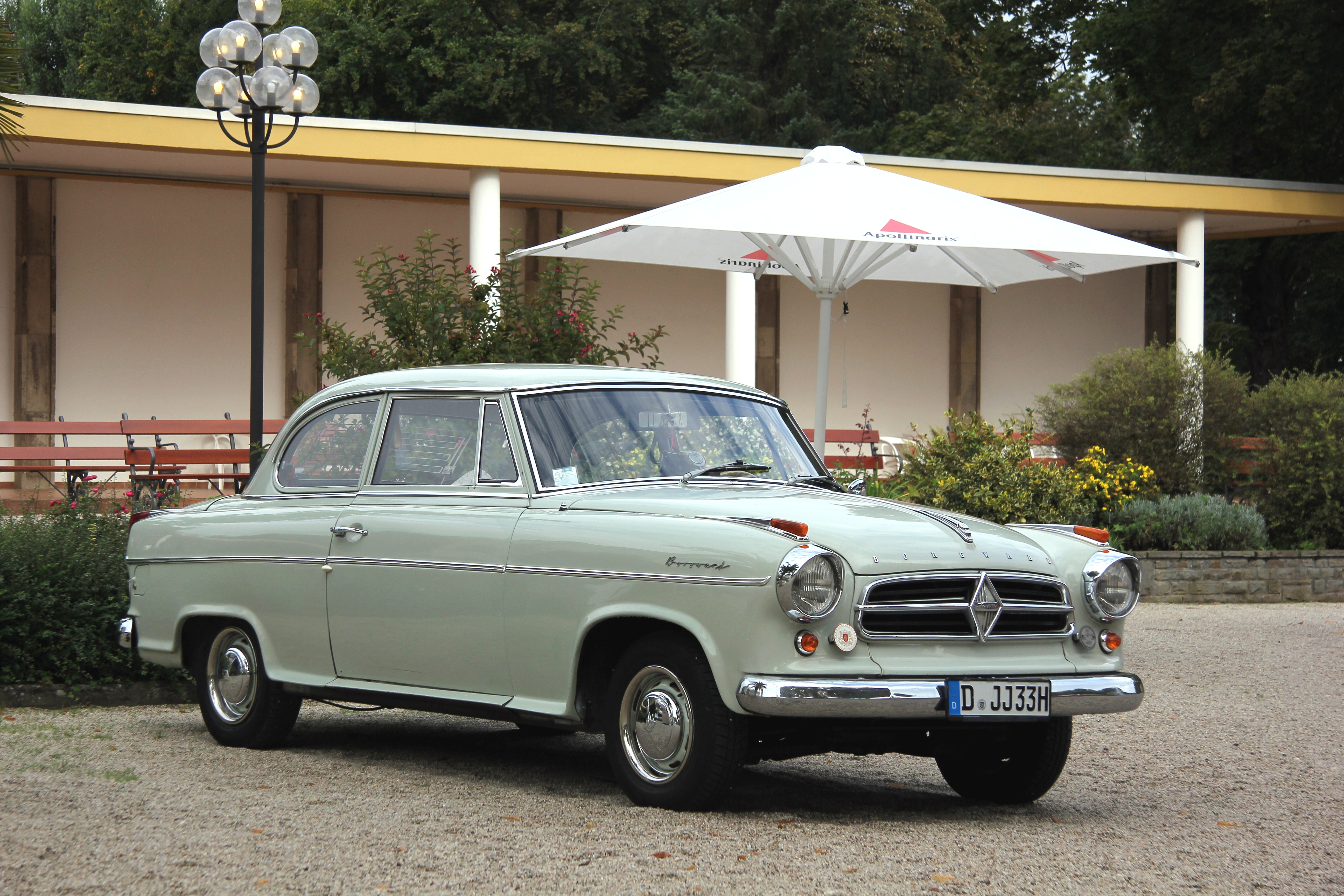 Borgward Isabella (Kennzeichen des Fahrzeugs verändert)